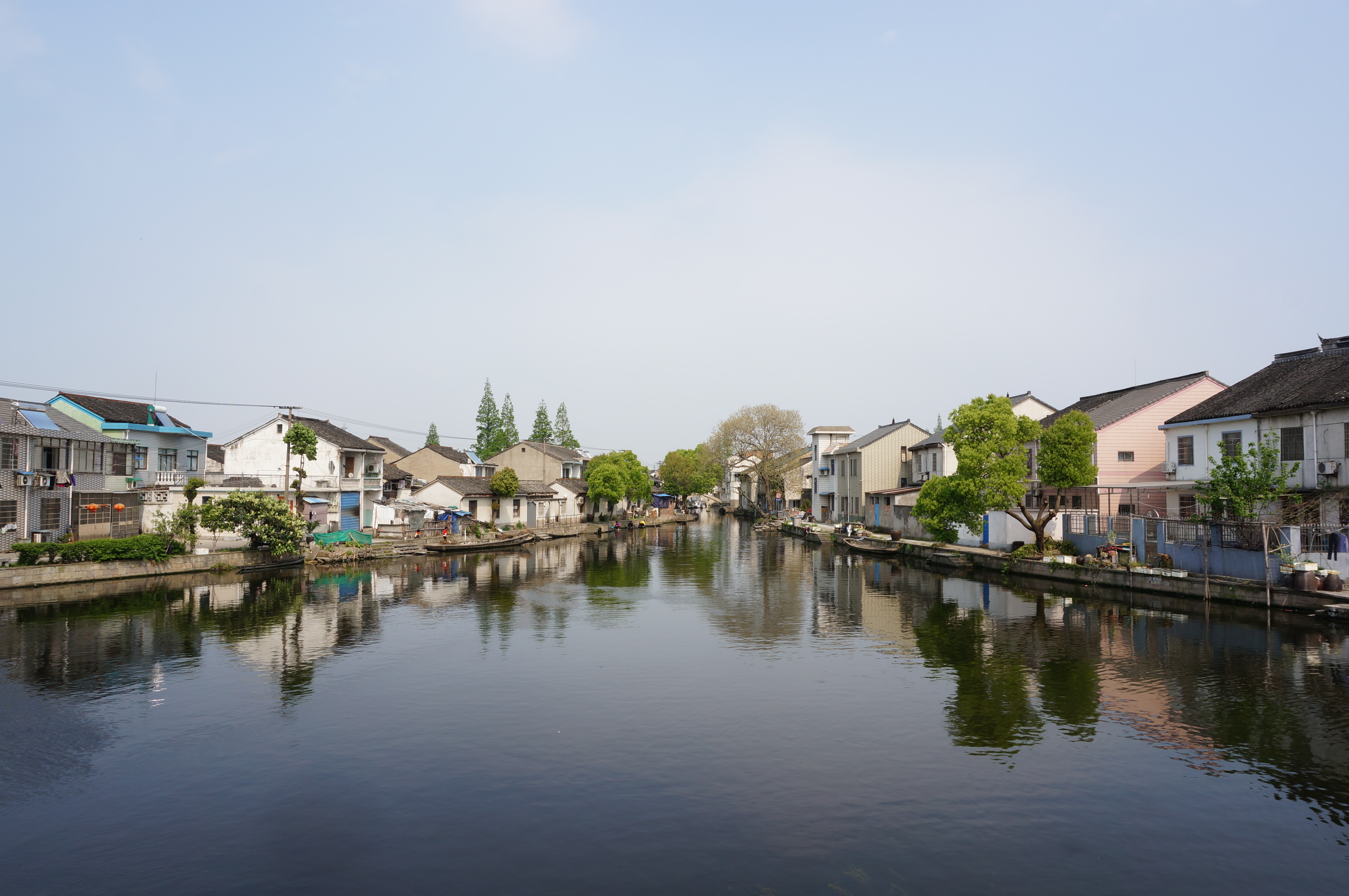 自环西路看东浦镇东西向主河道。